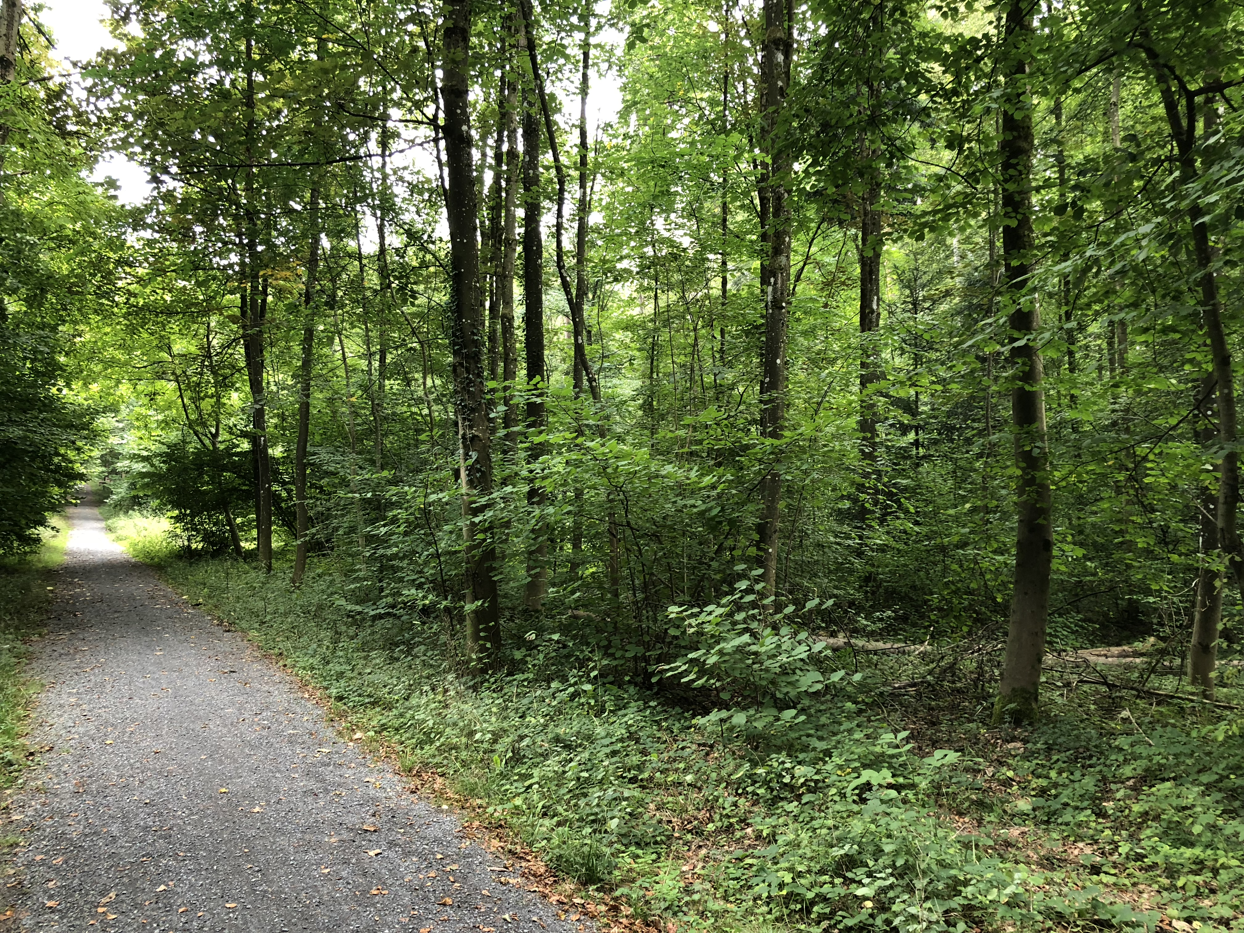 frühere Lage des Rumensee, heute im Wald oberhalb Goldbach